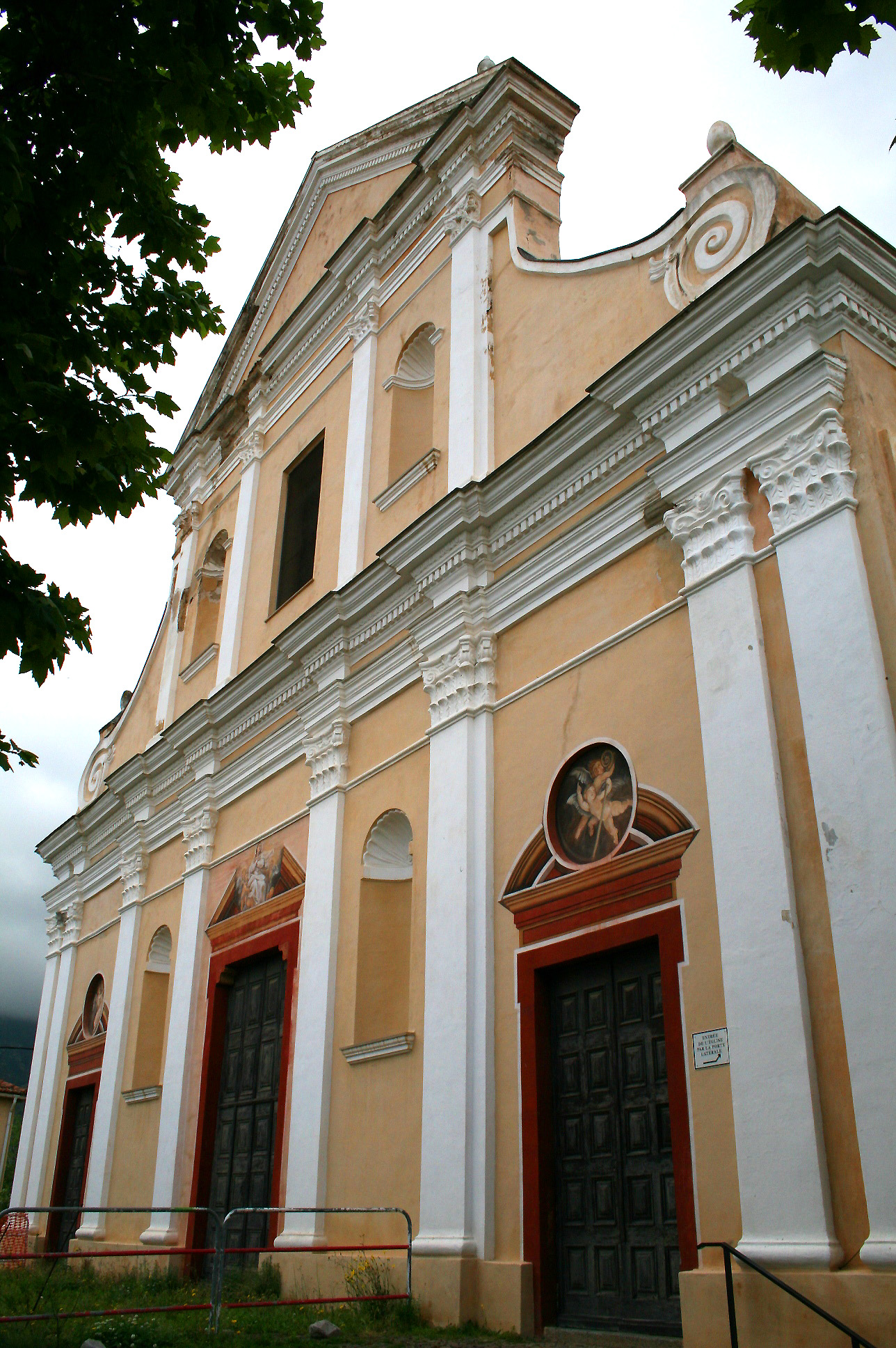 Calenzana - (Haute-Corse, France), l’église Saint-Blaise (1691-1701) – Architecte : Domenico Baïna. Corsu: Calenzana (Francia – Corsica suprana), a chjesa (1691-1701) – Architettu: Domenico Baïna. Walon: Calenzana (France – Corse do Nord), l’èglîje (1691-1701) – Ârchitèke: Domenico Baïna.